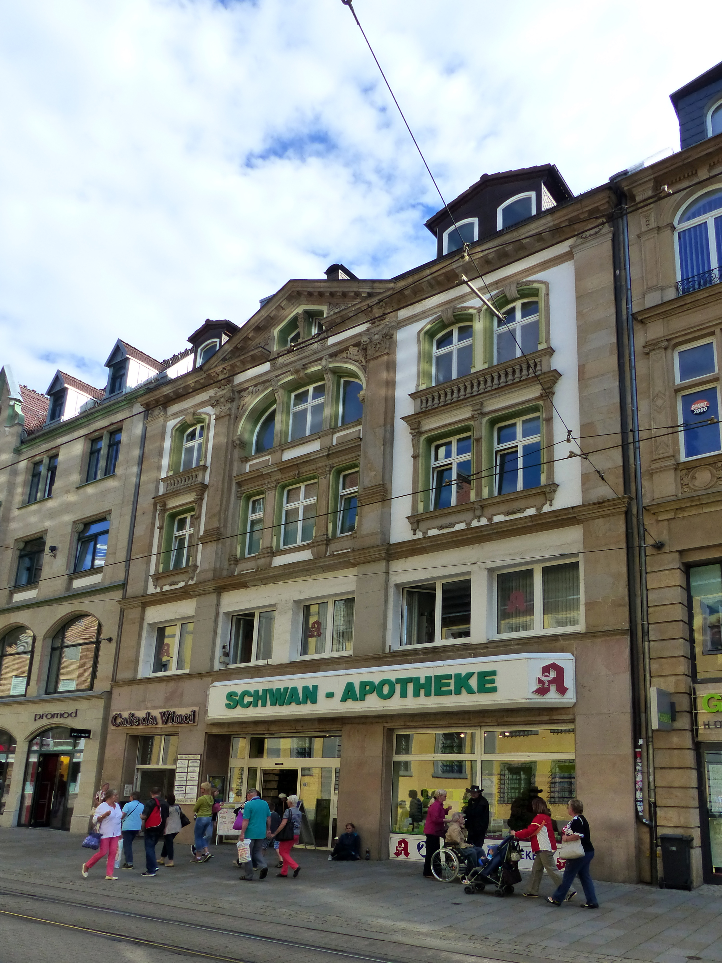 Denkmalgeschütztes Wohn- und Geschäftshaus, Bahnhofstraße 2, Erfurt